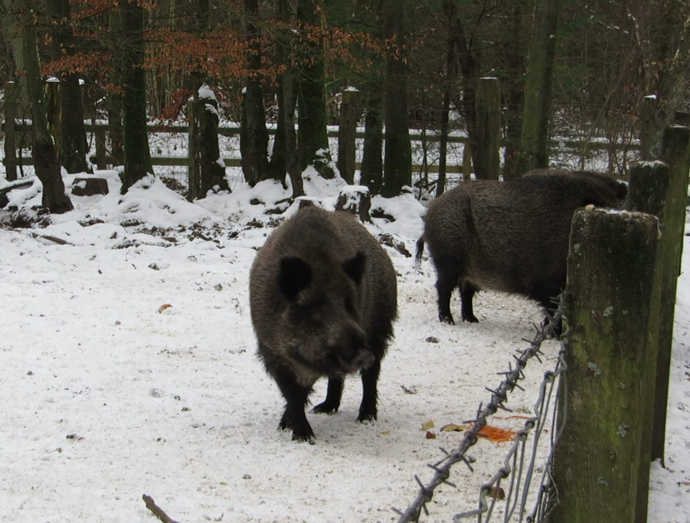 Wildschweine, Marienhölzung, Flensburg, Januar 2013